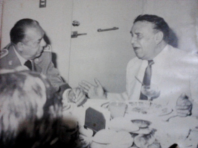 Arturo Durazo Moreno y Alfredo Ruiz del Rio S.